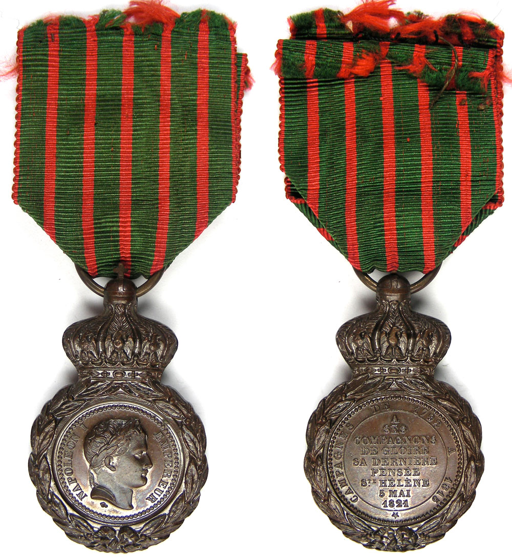 Avers et revers de la médaille de Sainte-Hélène, première médaille commémorative officielle